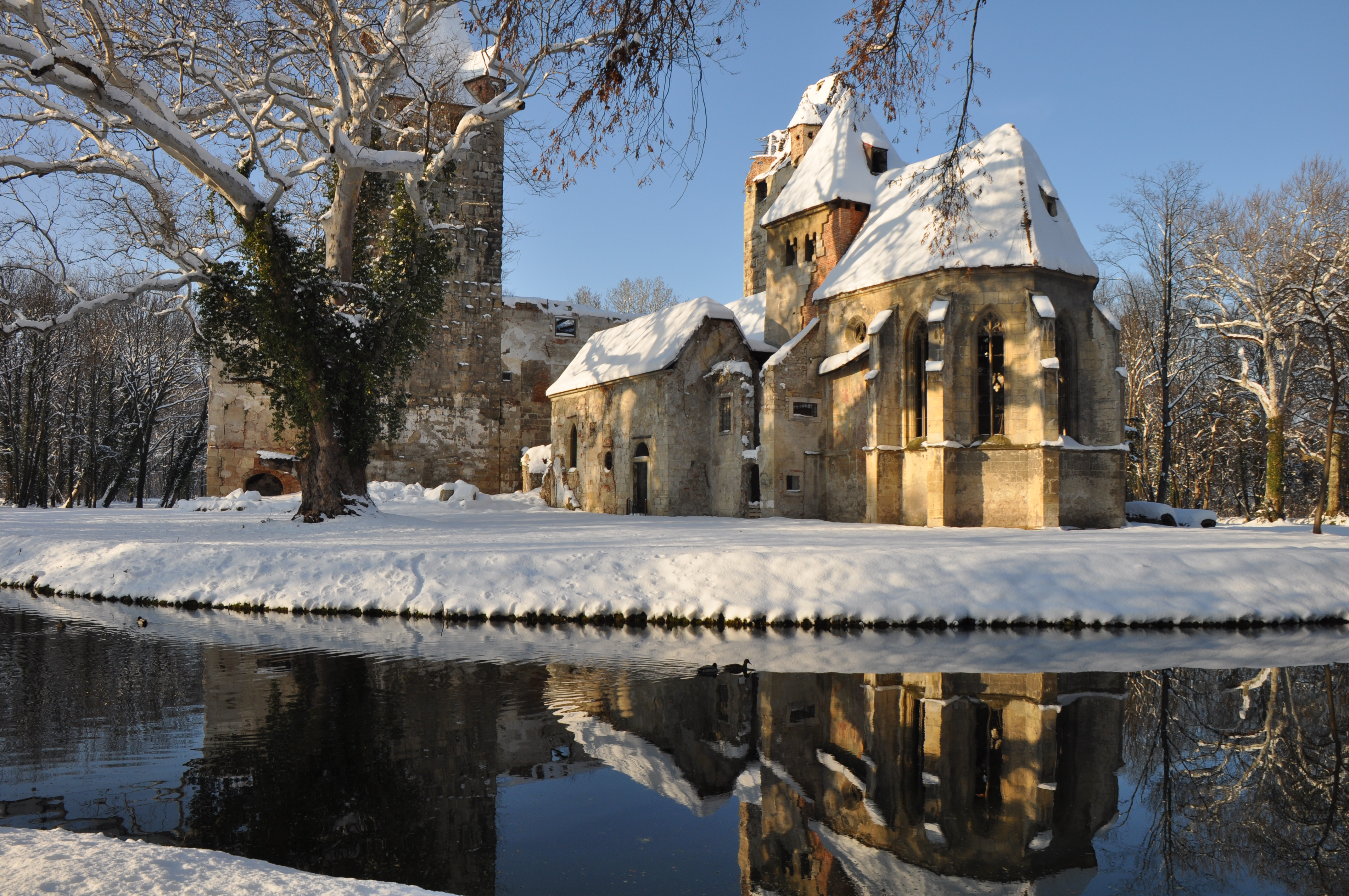 Schlossruine Pottendorf samt Kapelle